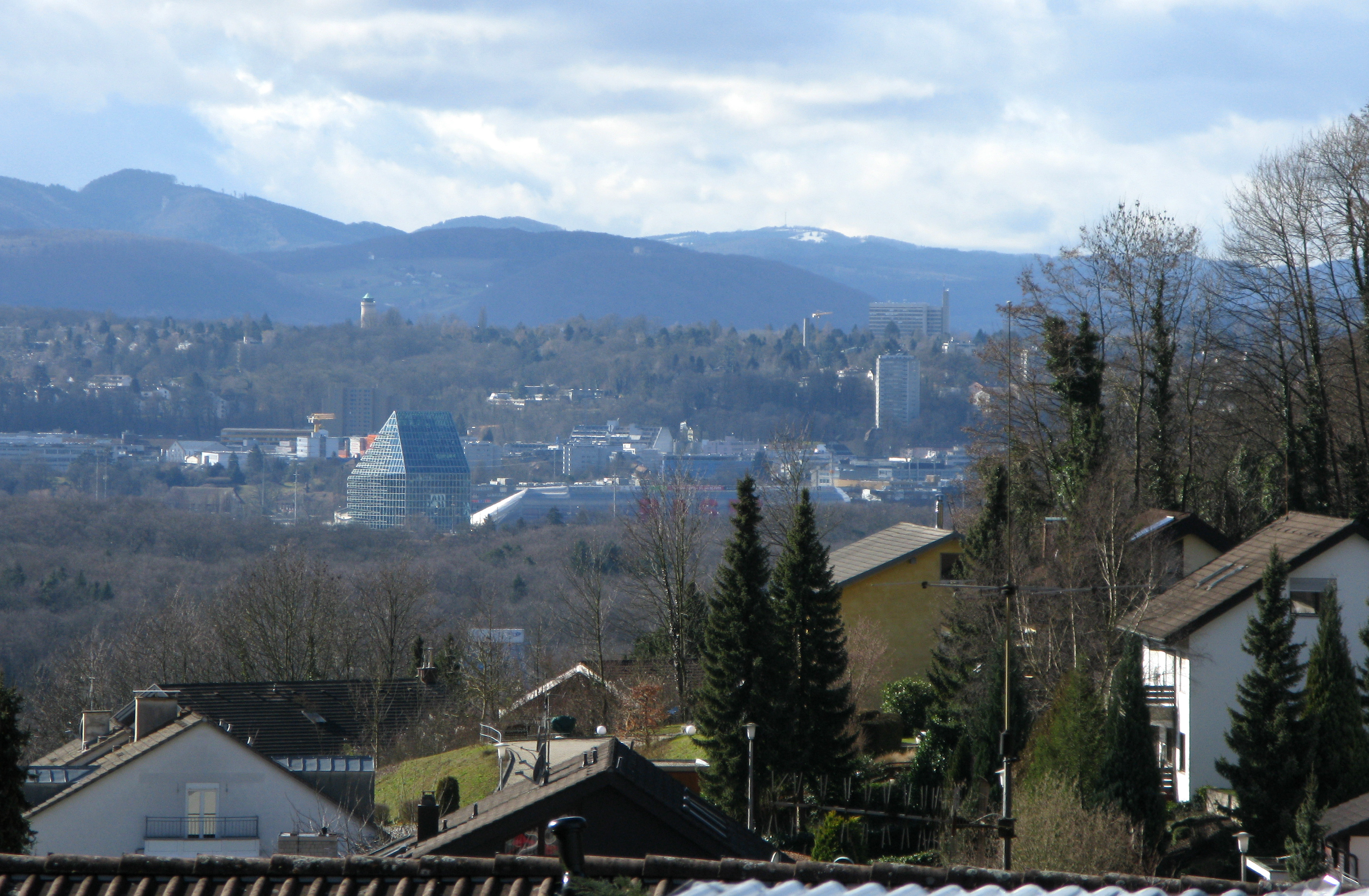 Blick Richtung St. Jakob und Bruderholz von der oberen Talstraße in Grenzach